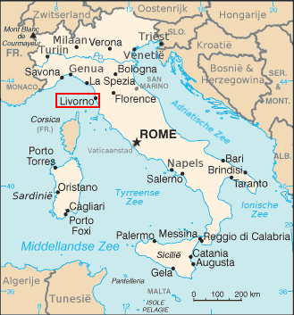 Oorspronkelijk uit CIA Factbook; vertaald in Nederlands door Danielm; omgezet in PNG door BenTels, + verbetering spelling; Livorno met rood gemarkeerd door mij